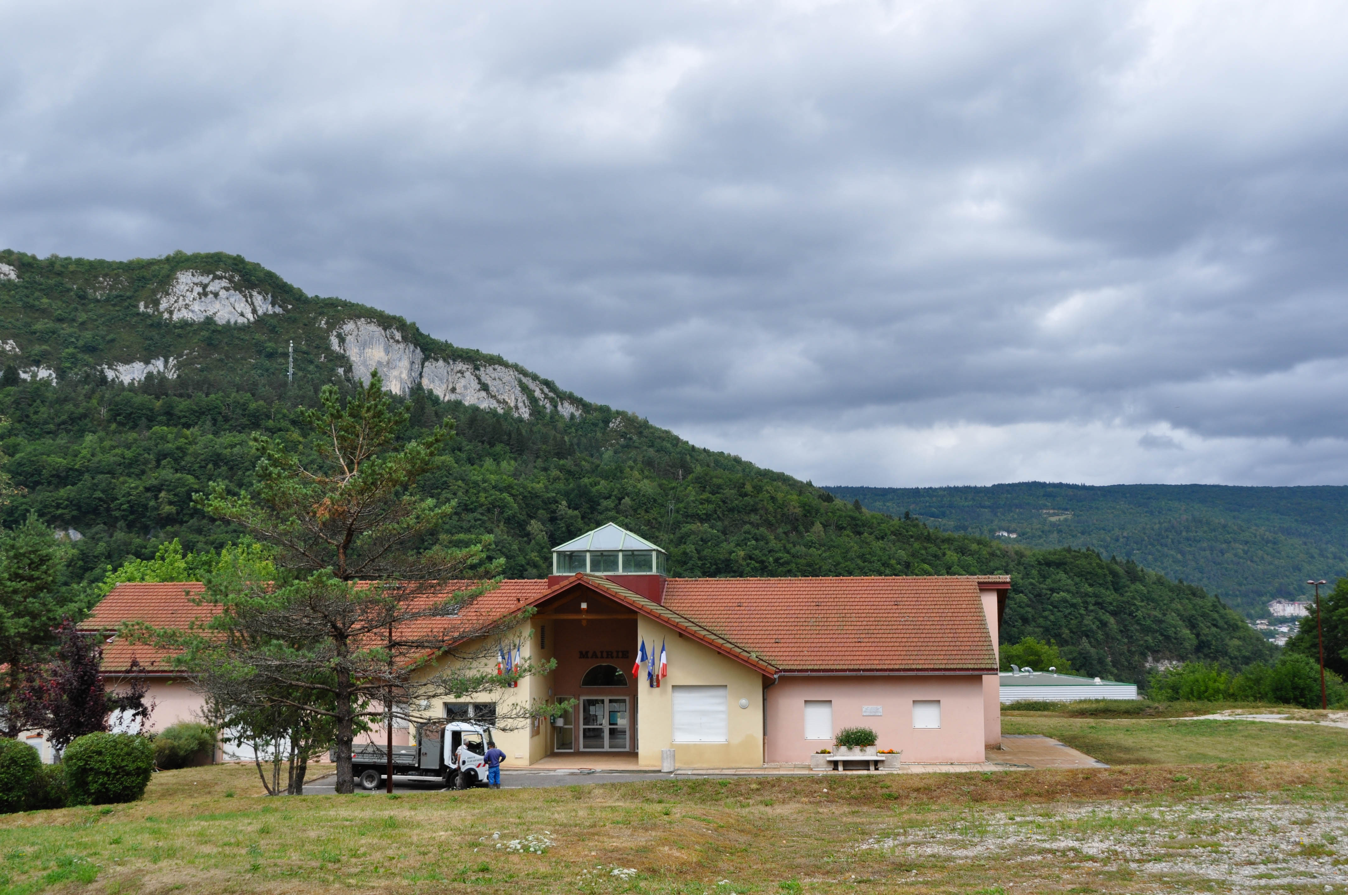 Mairie à l'Essard, commune de Villard-Saint-Sauveur (Jura, France).